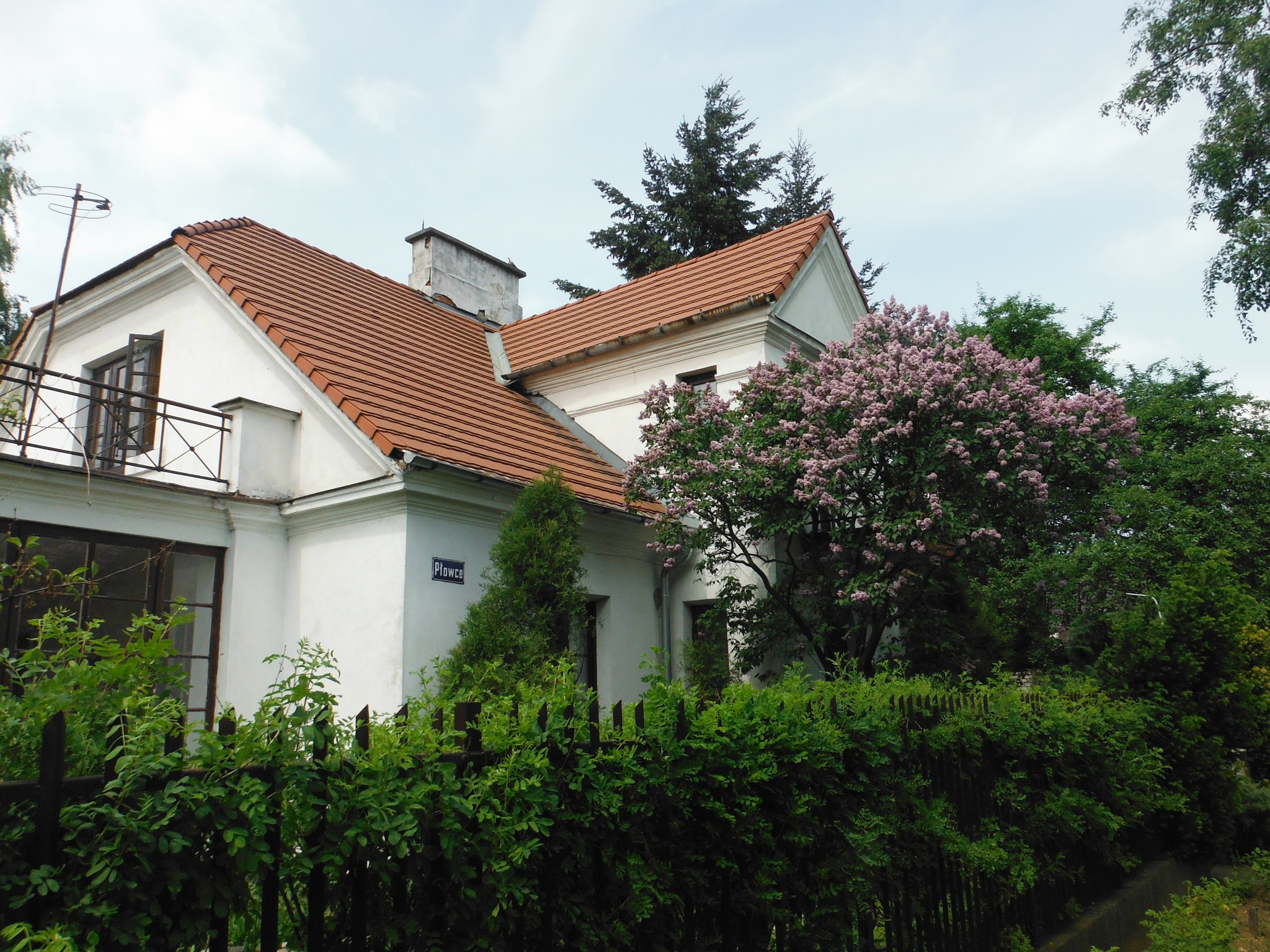 Zabudowa Kolonii Praussa na warszawskim Grochowie.